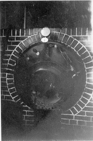 5. In der Kesselanlage wird durch Verbrennung von Steinkohle bzw. Briketts der notwendige Heißdampf für die Dampfmaschine erzeugt (etwa um 1933).